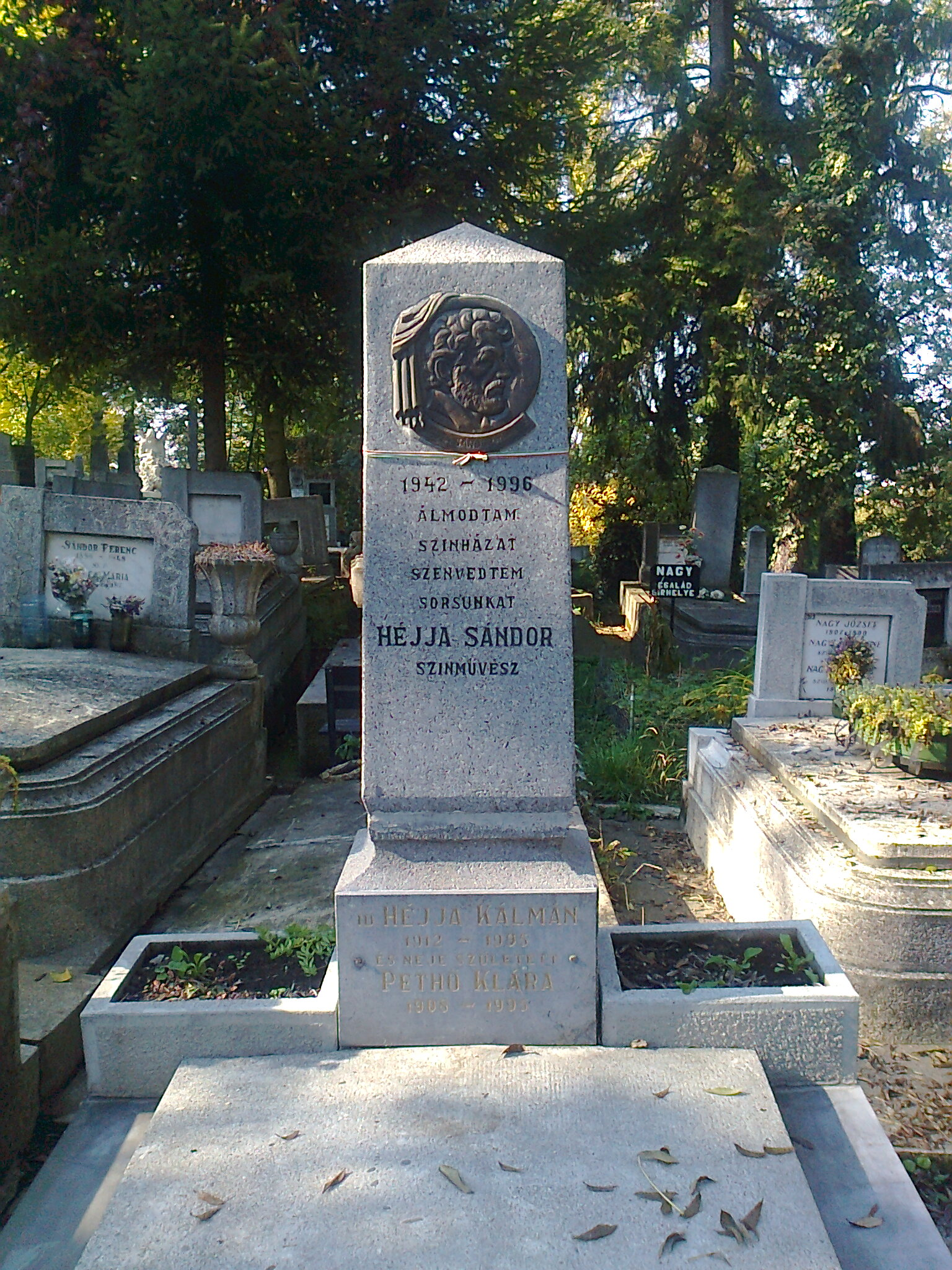 Héjja Sándor színművész sírja a marosvásárhelyi református temetőben